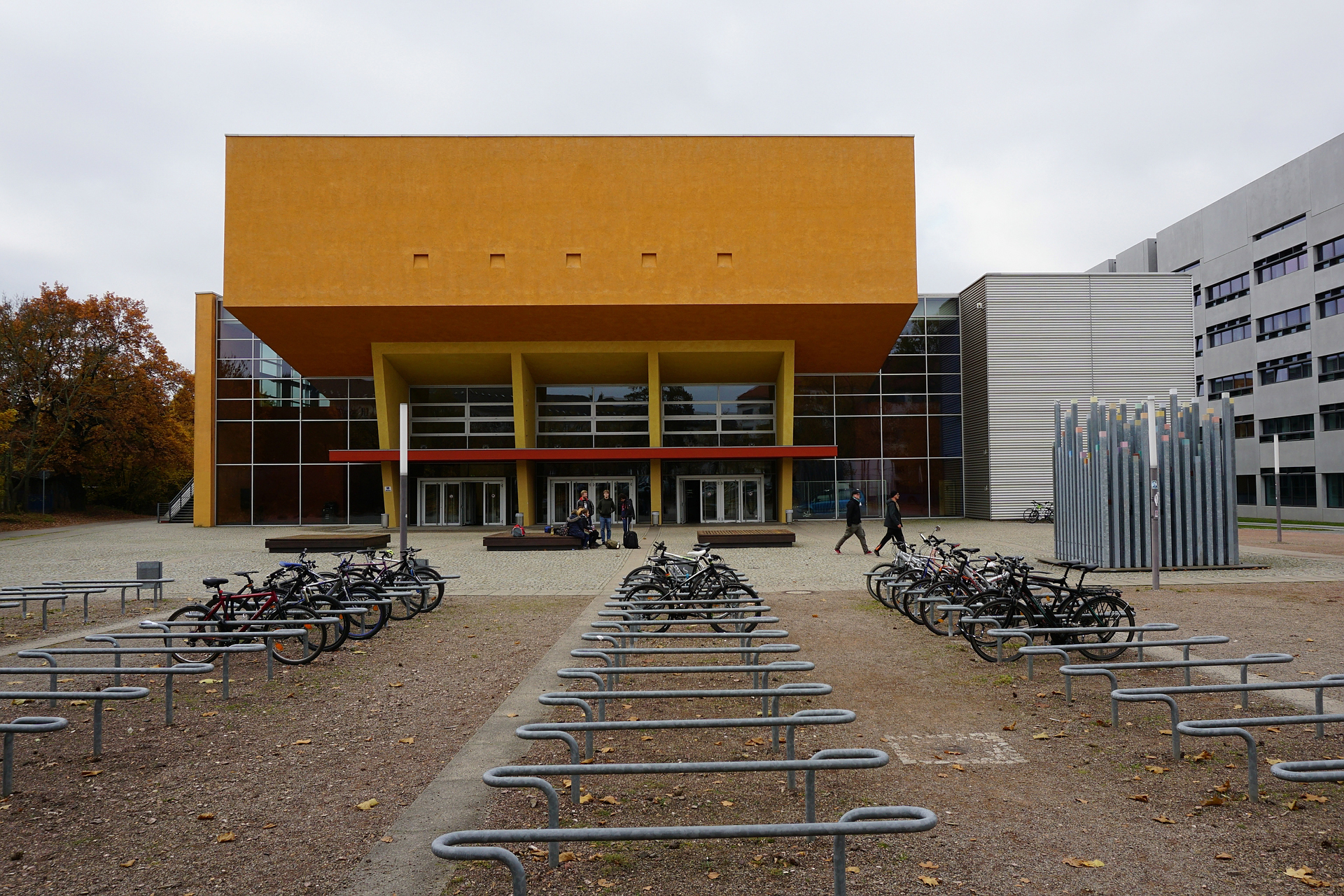 Das Hörsaalgebäude der TU Chemnitz an der Reichenhainer Straße, 2015